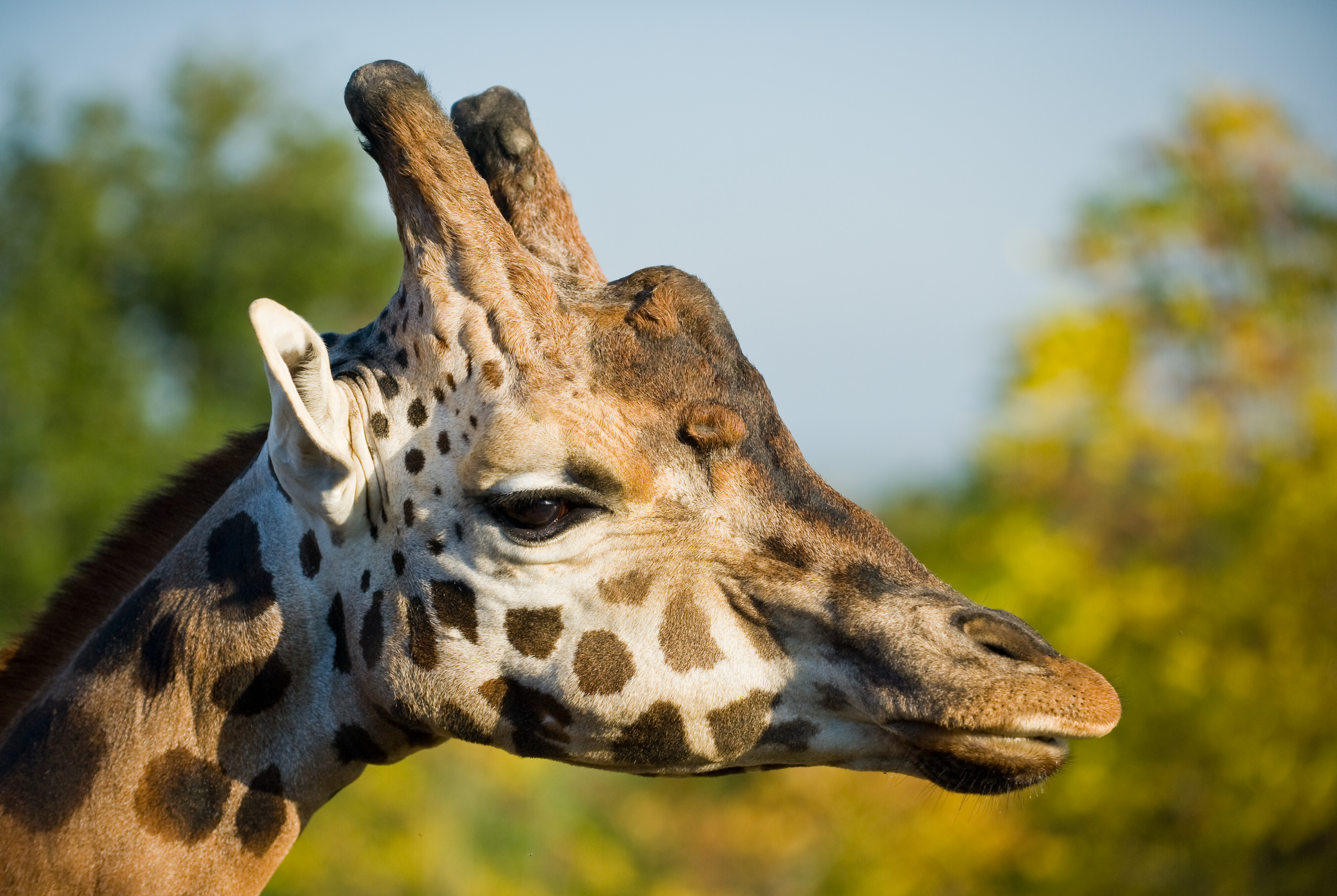 Giraffenkopf im Seitenprofil, aufgenommen im Zoo d'Amnéville (F).